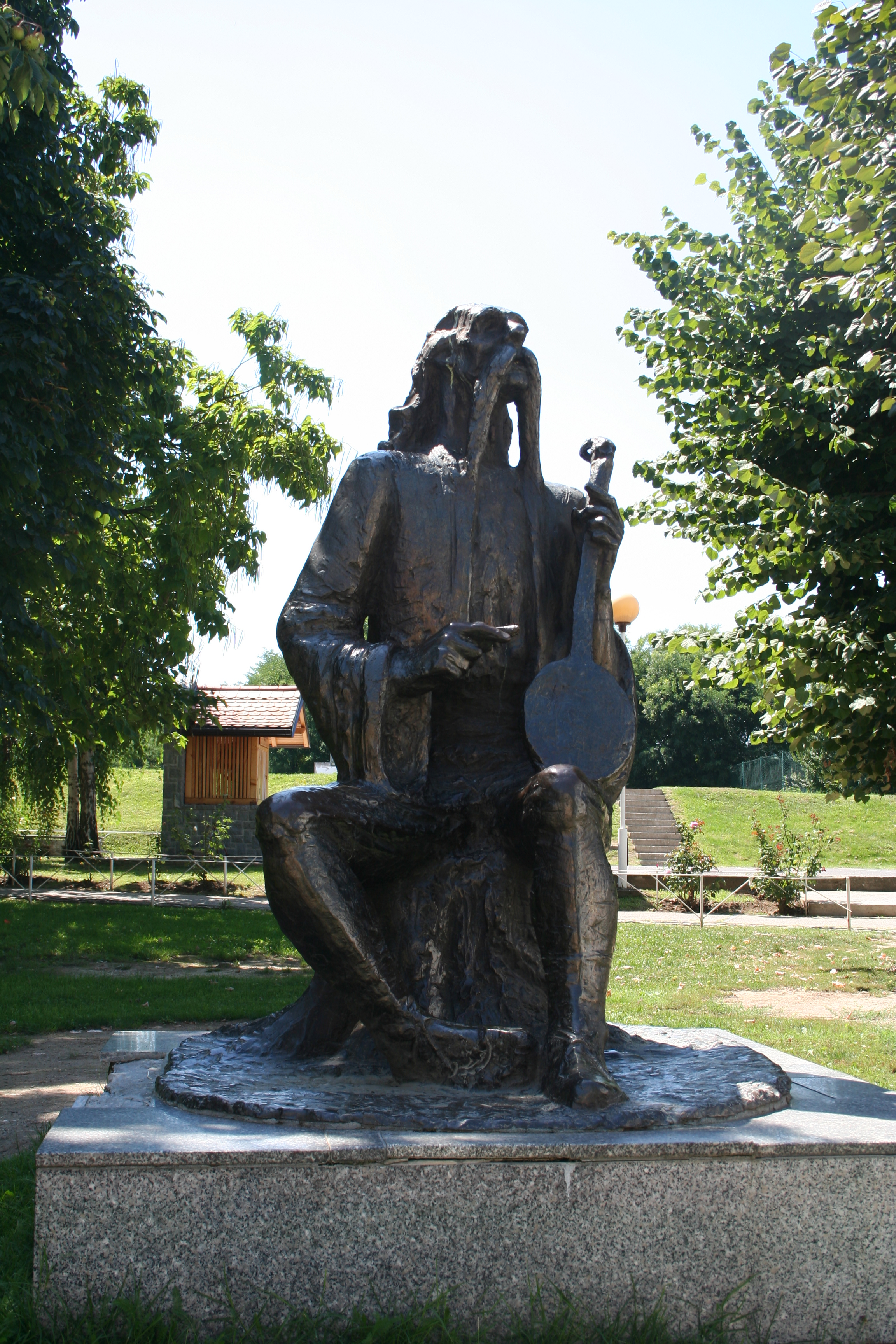 Spomenik Filipu Višnjiću, Loznica